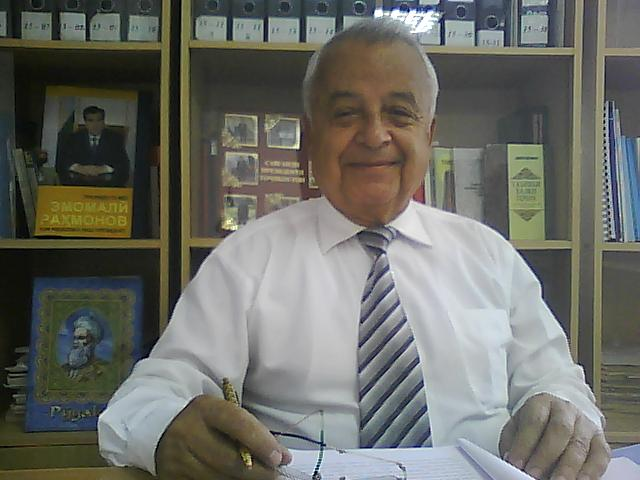 Намоз Хотамов,профессор Института предприниматеьства и сервиса (Таджикистан)